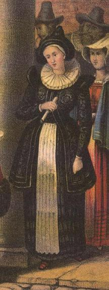 Bremer Frauentracht um 1750